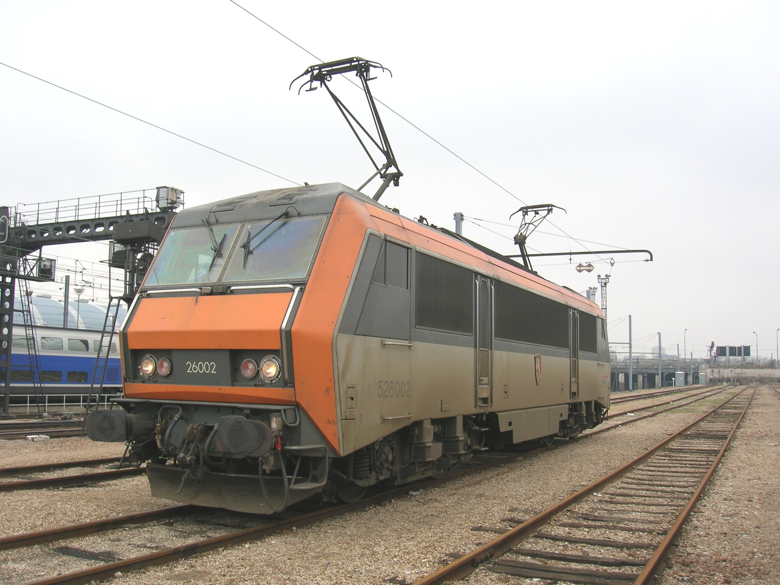 La 26002 à Paris Bercy en attente de mise en tête de son train Corail.